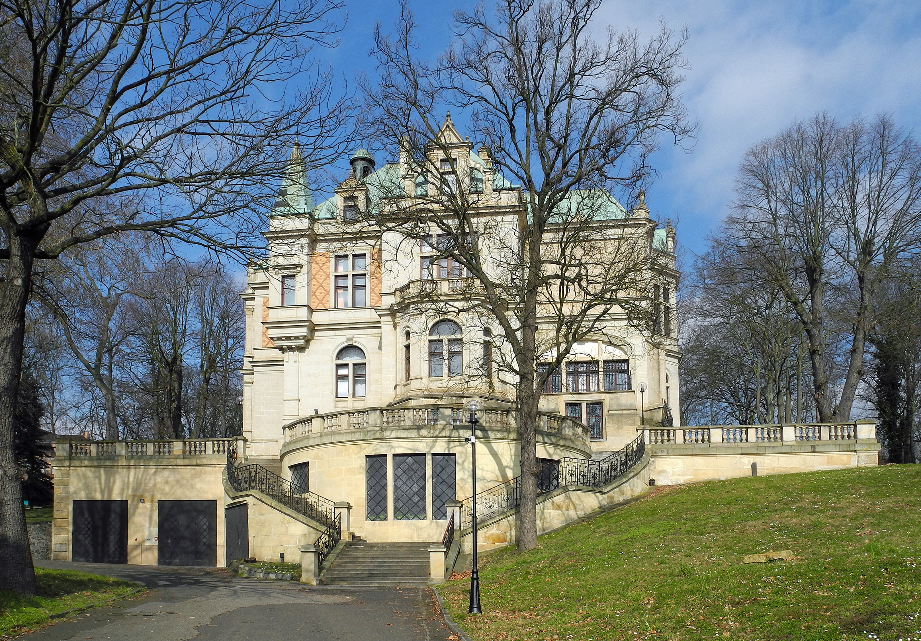 Gebäude in Aussig - Ústí nad Labem, Na Schodech 1601/10 - ehem. Wolfrum-Villa, jetzt Radio Sever